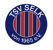 Vereinslogo des Sportvereins der Gemeinde Selk.